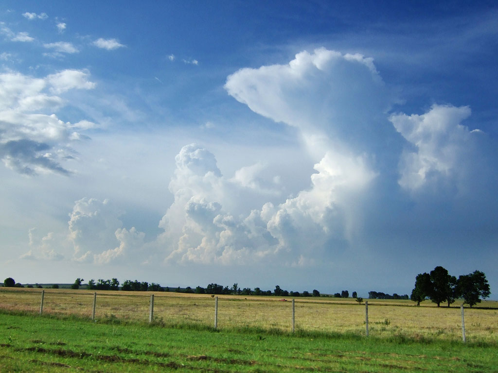 На връщане към София (27.05) ни съпроводи слънчево време с много интересни облаци. Разбира се, след Траянови врата вече валеше дъжд. Типично.